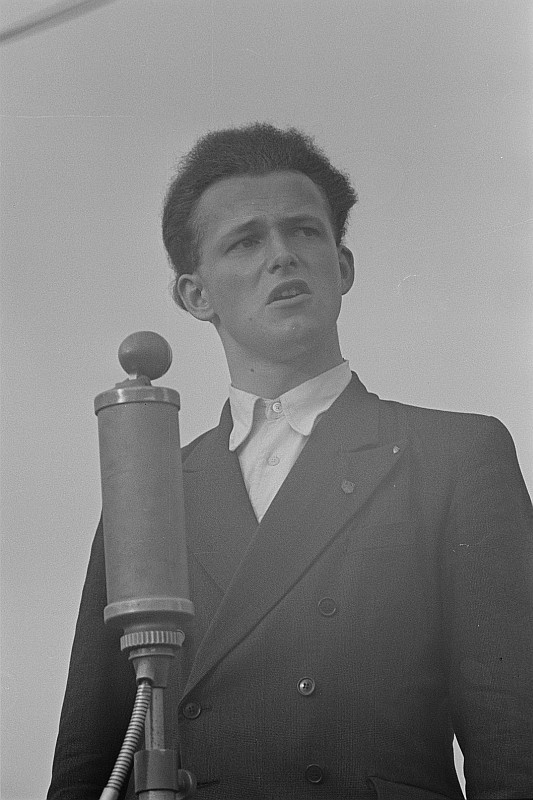 Original image description from the Deutsche Fotothek Portrait Manfred Gerlachs (Auftritt des Moissejew-Ensembles im Bruno-Plache-Stadion)